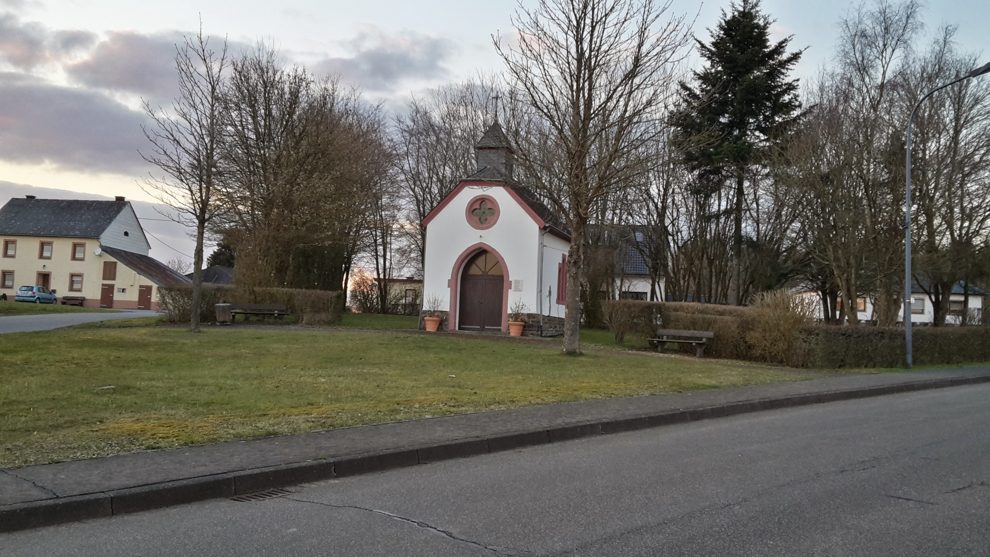 Zu sehen ist die Aloysiuskapelle in Daleiden.